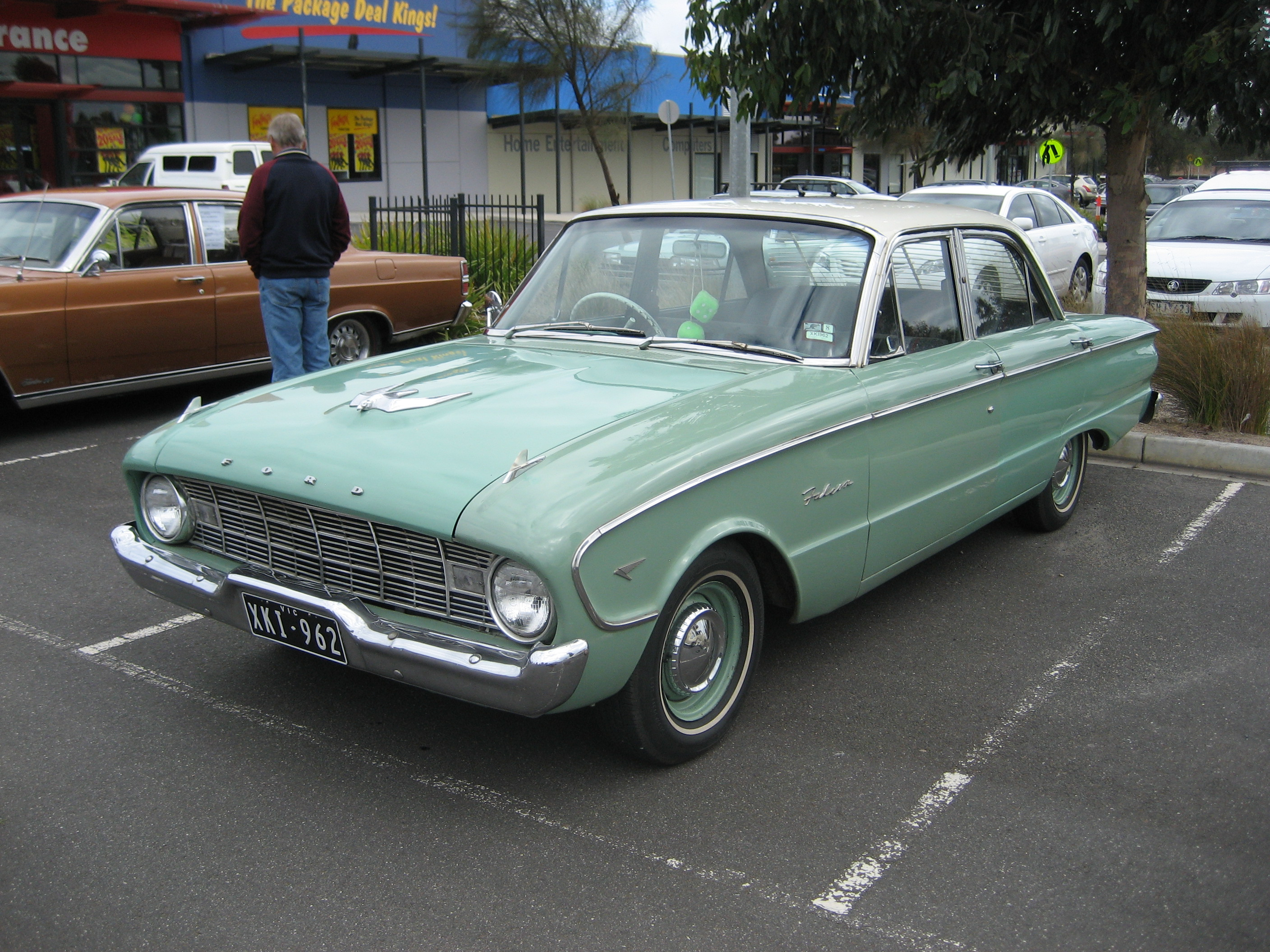 1962 Ford XK Falcon Deluxe Sedan. VIN: ZAH49618M